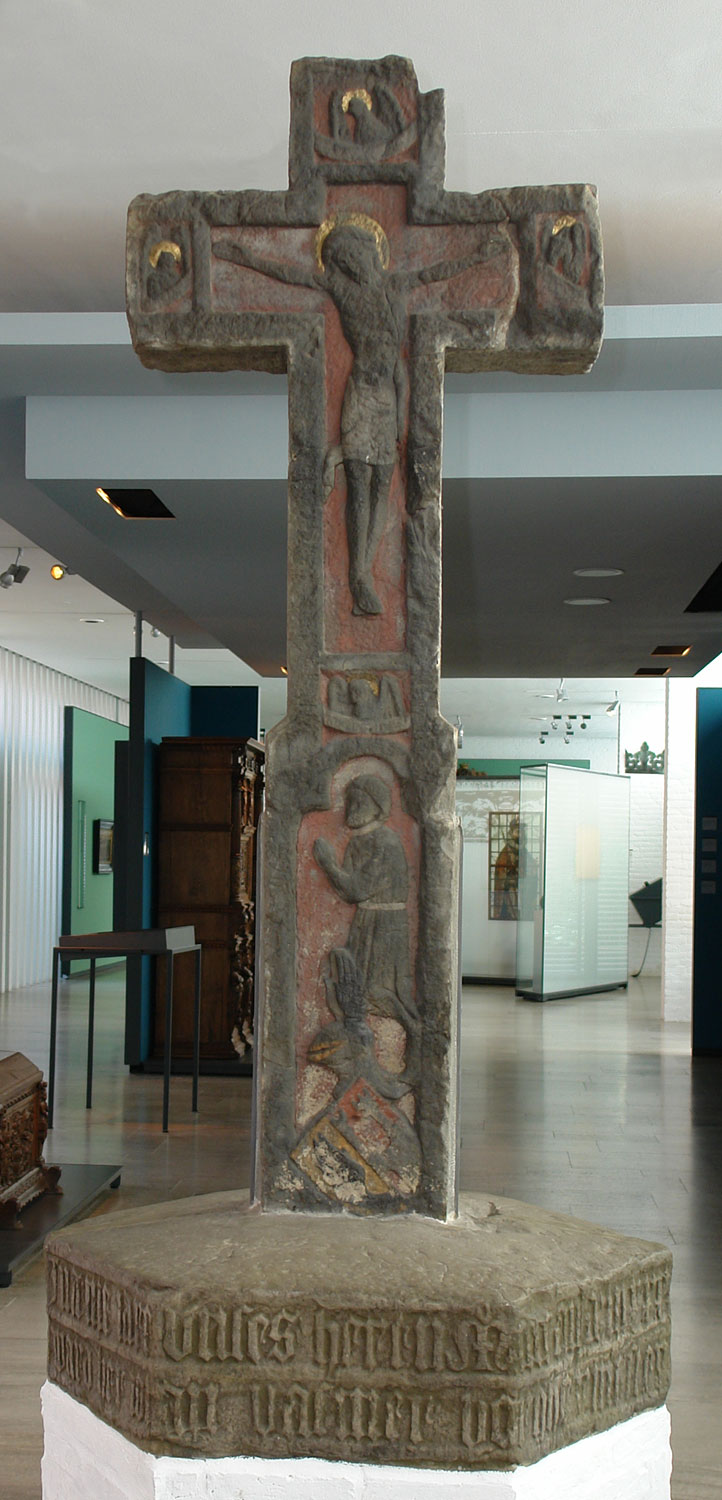 Focke-Museum Bremen: Steinkreuz für Bürgermeister Vasmer. Original von 1435, Sockel Abguss k: kunst im öffentlichen raum bremen